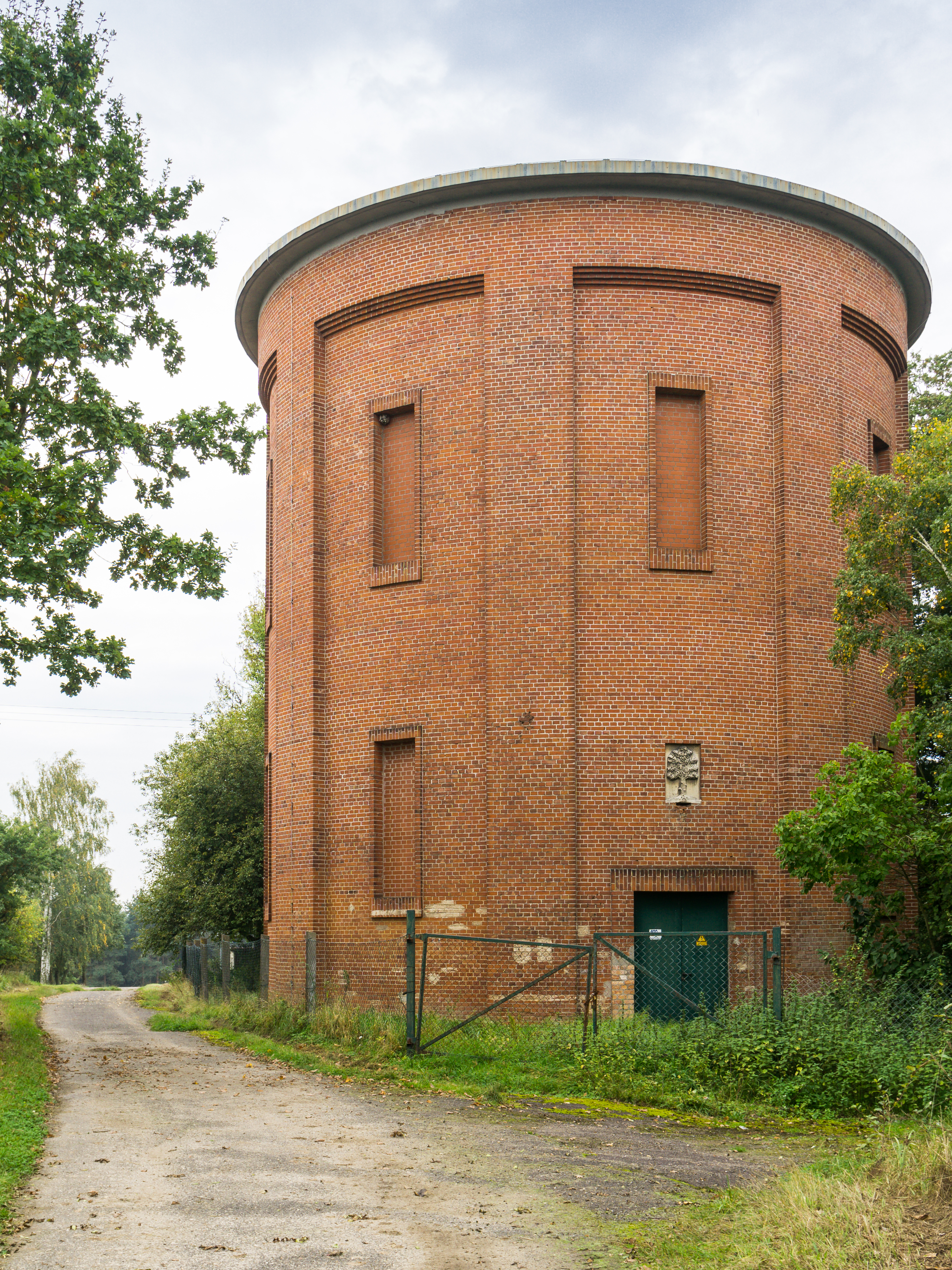 Wasserturm Weferlingen am Spellersieck westlich von Oebisfelde-Weferlingen OT Flecken Weferlingen